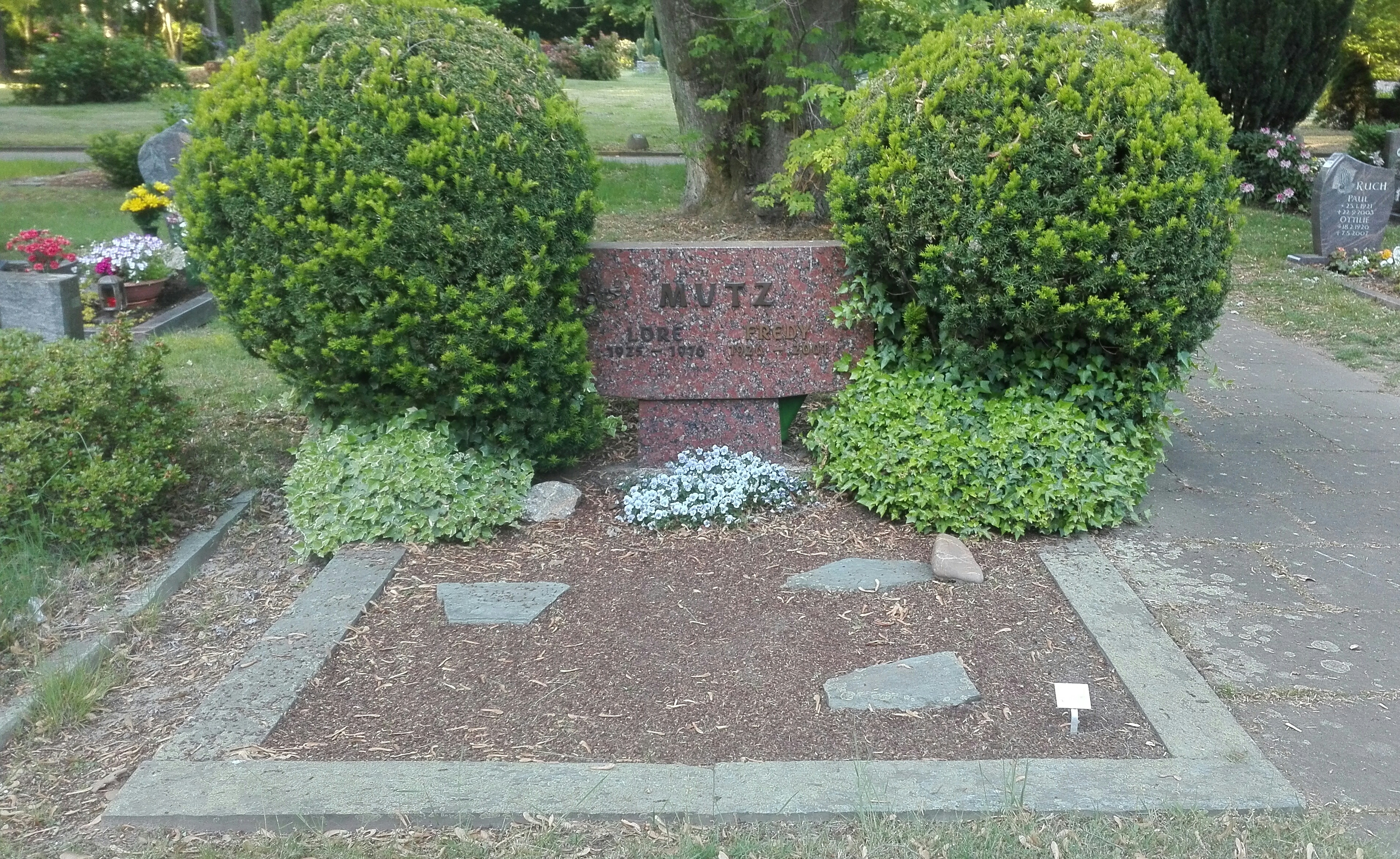 Das Grab von Fredy Mutz auf dem Reuschenberger Friedhof in Leverkusen Küppersteg